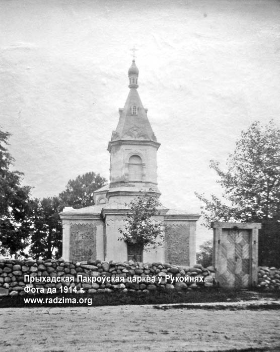 Беларуская (тарашкевіца): Рукойні (Rukojni). Пакроўская царква-мураўёўка